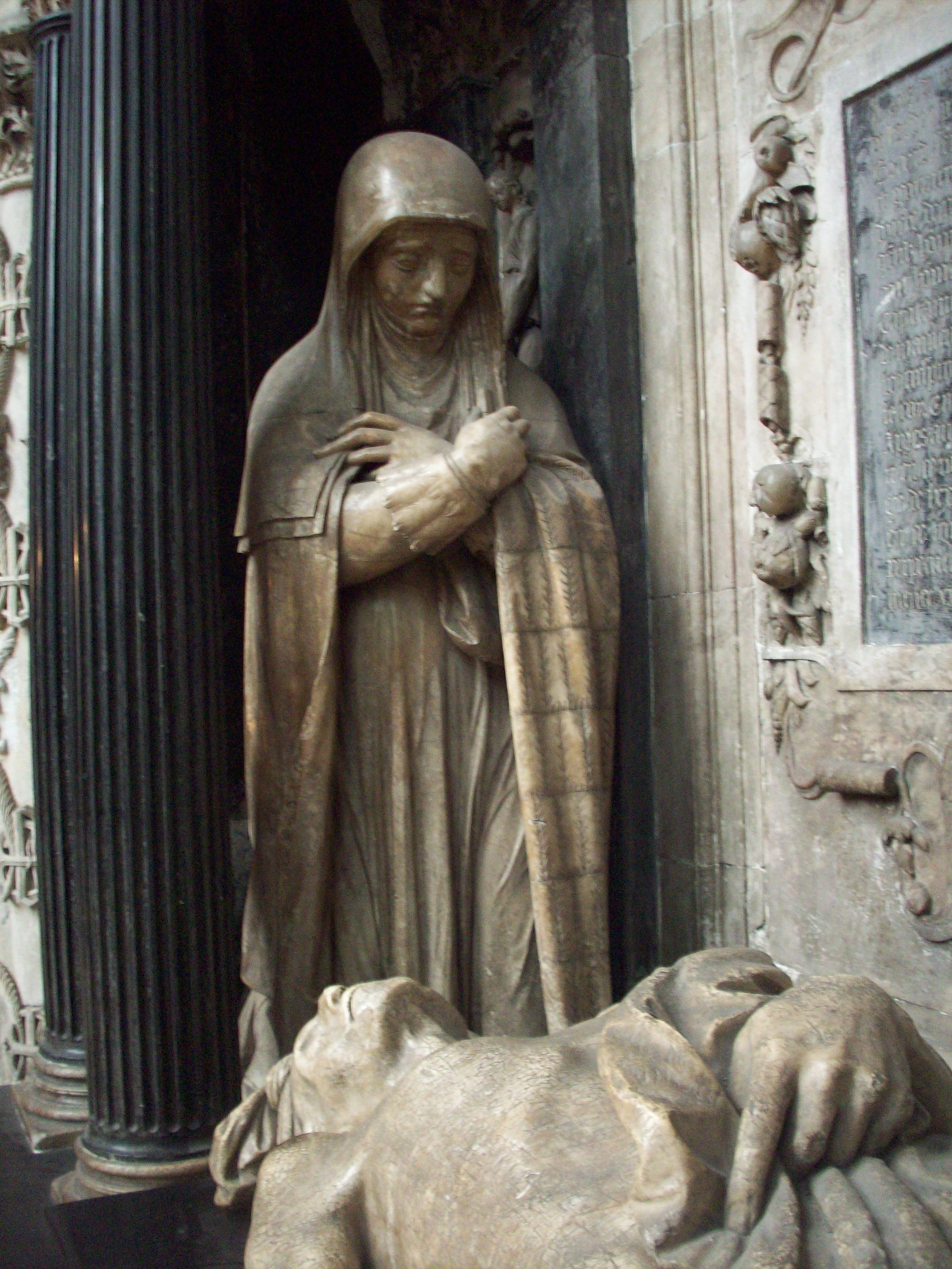 Diane de Poitiers, agenouillée, devant la dépouille de son mari Louis de Brézé, sur son mausolée dans la chapelle de la Vierge.